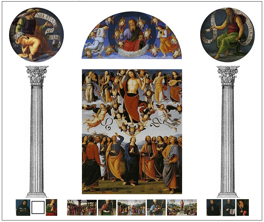 Reconstitution du Polittico di San Pietro (Perugino)